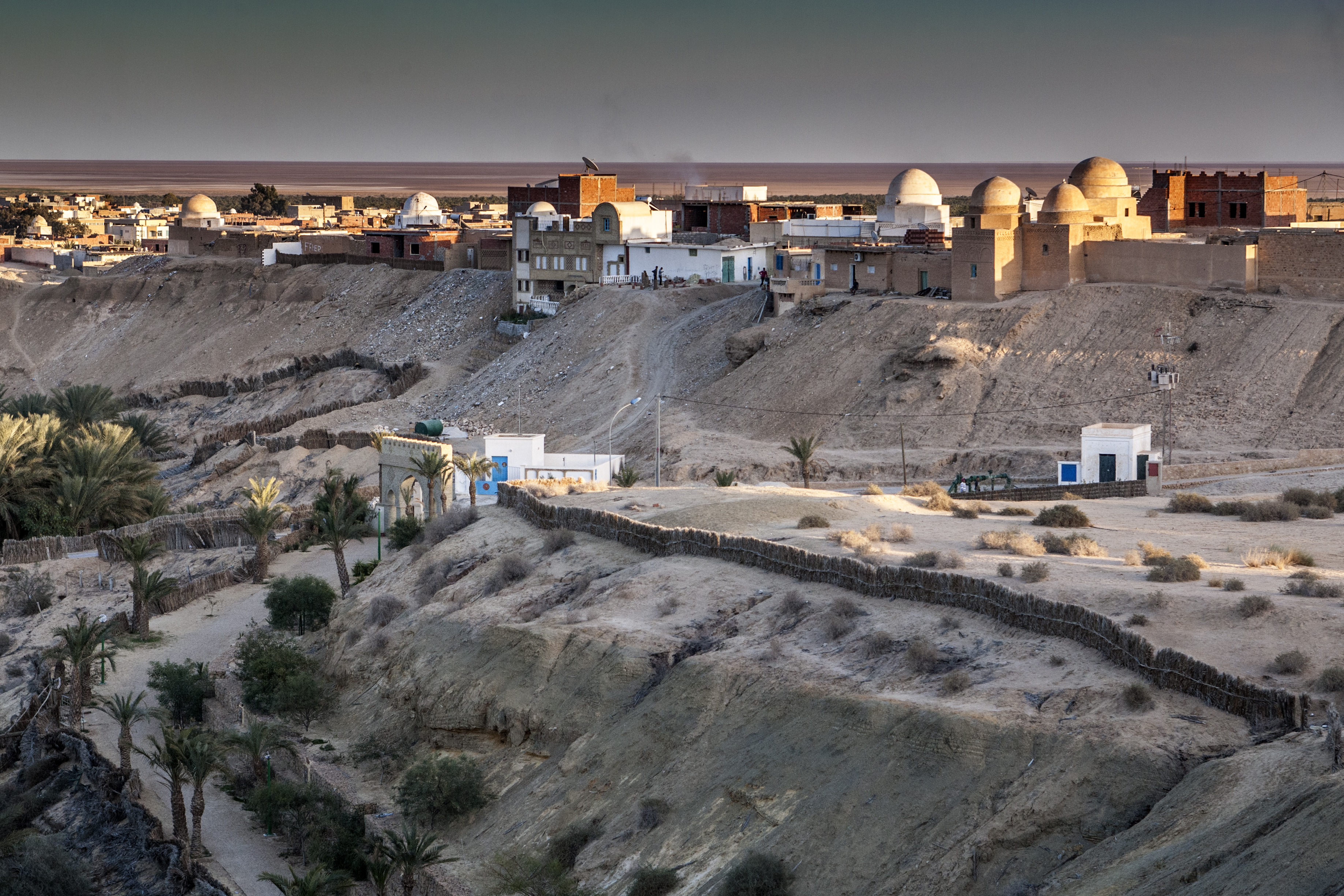 Miasto i oaza nad wąwozem La Corbeille. Duchowy ośrodek sufizmu. Miasto tysiąca kopuł.